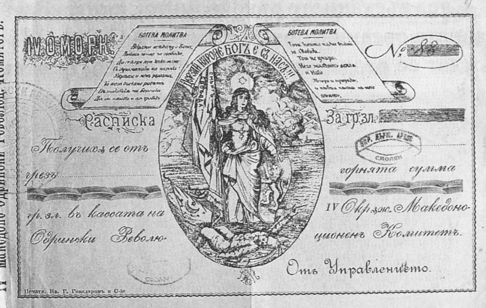 Разписка на Четвърти одрински революционен окръг на ВМОРО.